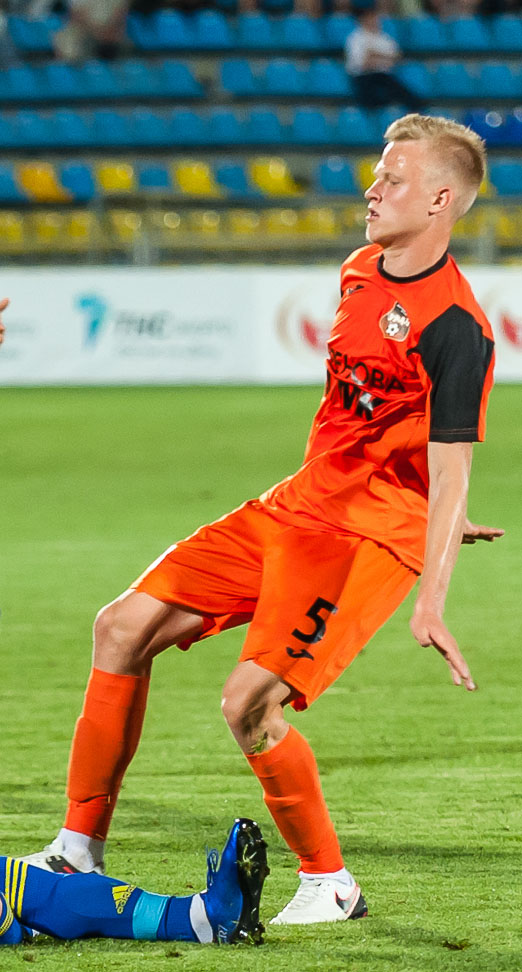 "Ростов" - "Урал"